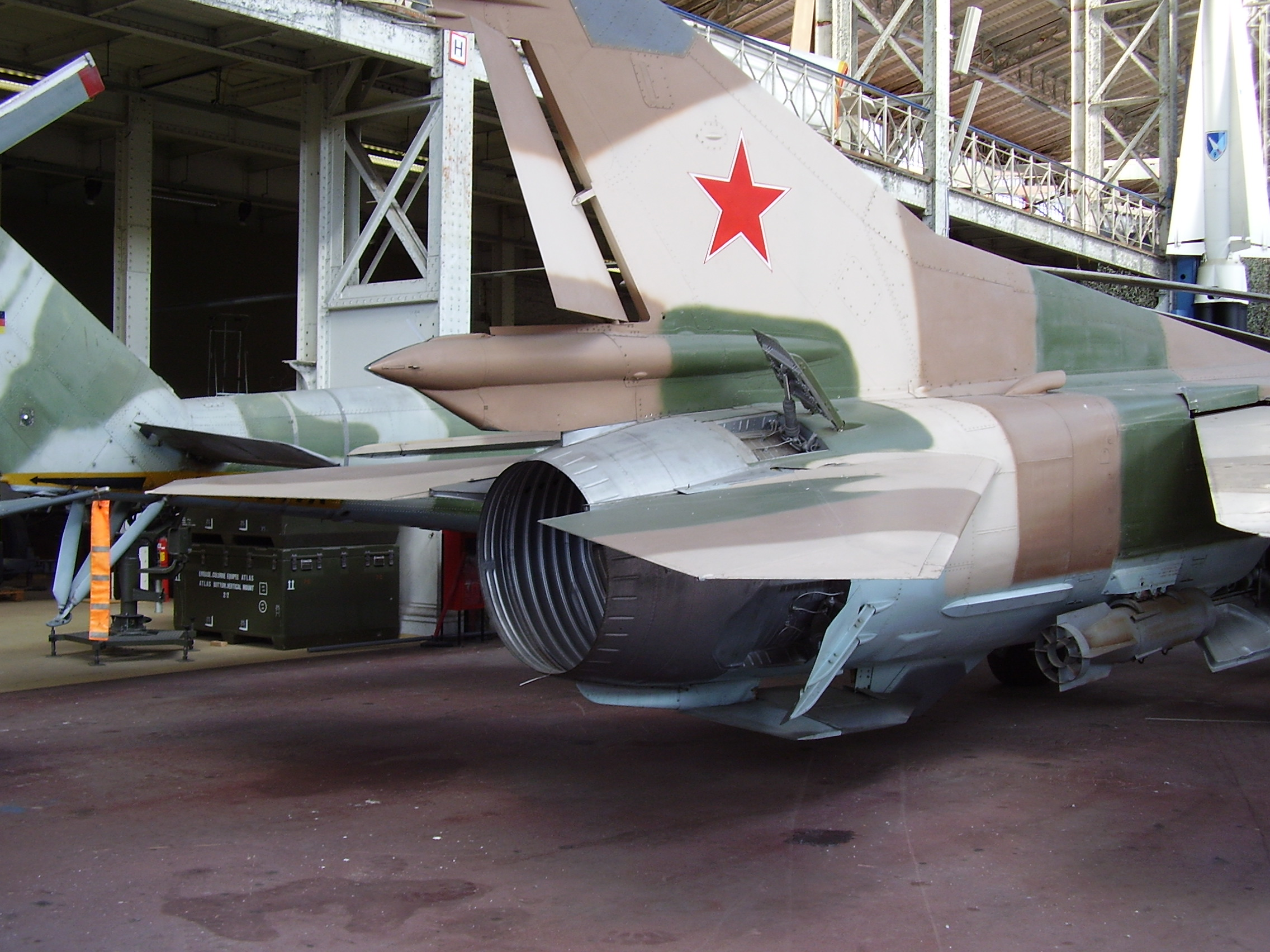 Royal Military Museum Brussels, Musée Royal de l'Armée, Koninklijk Museum van het Leger en de Krijgsgeschiedenis